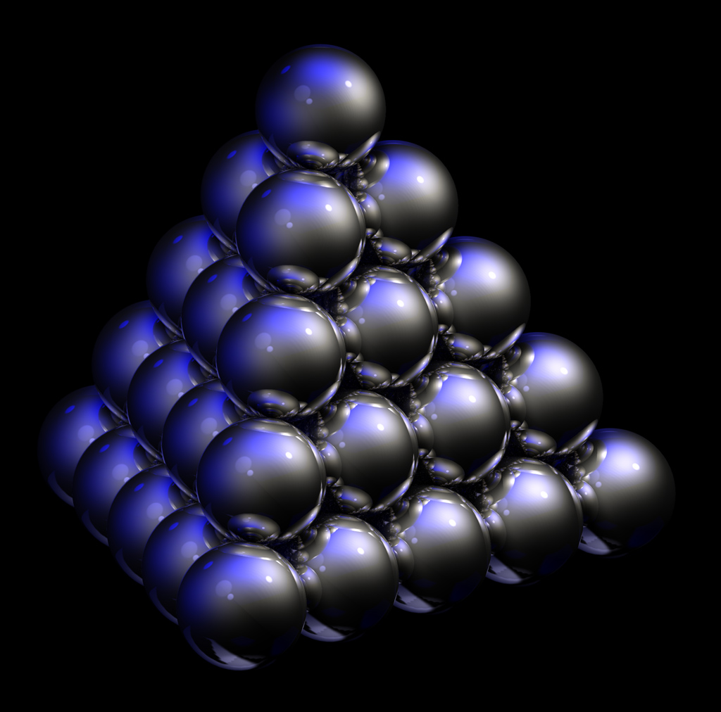 see below